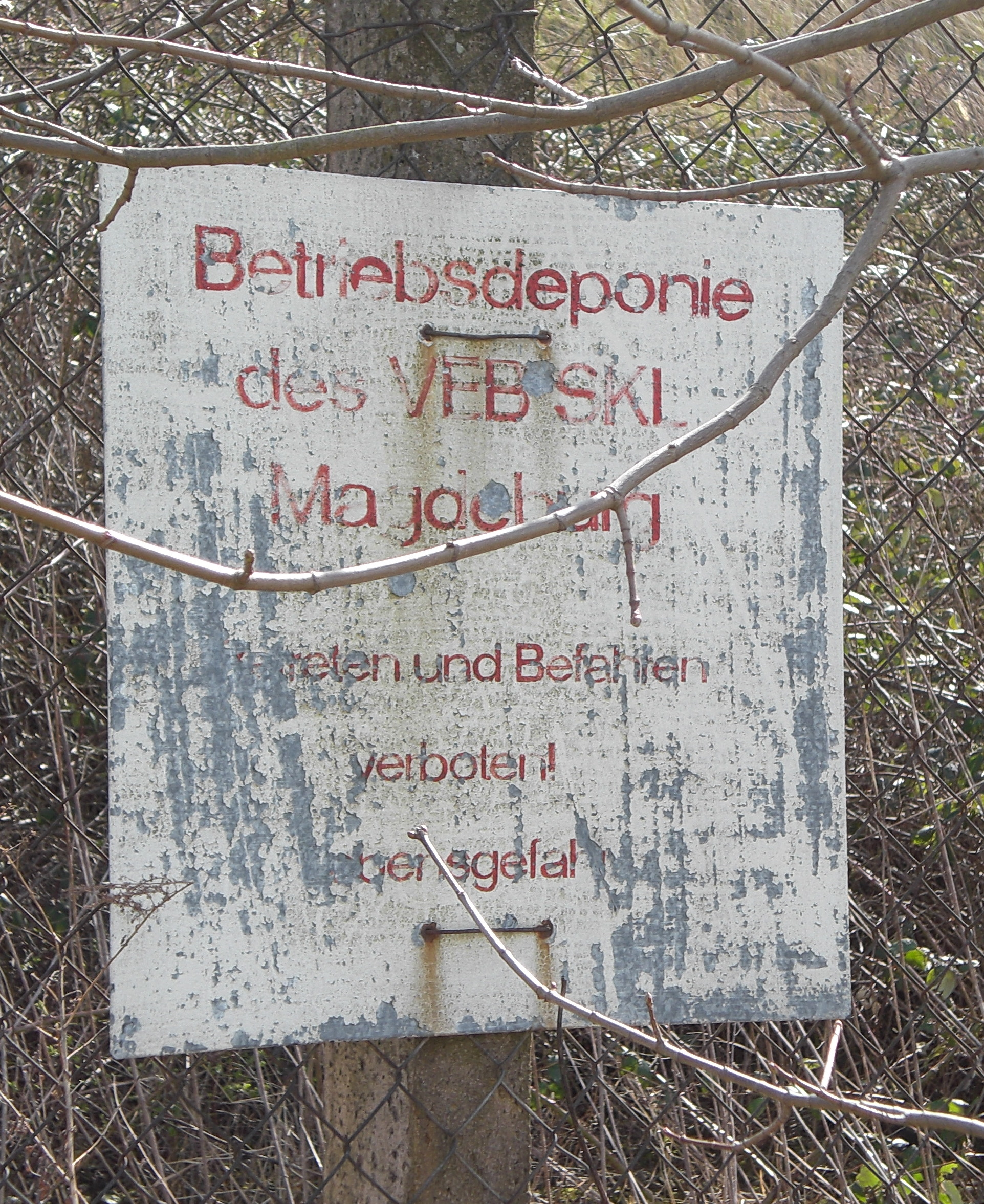 altes Schild an der SKL-Deponie in Magdeburg-Westerhüsen